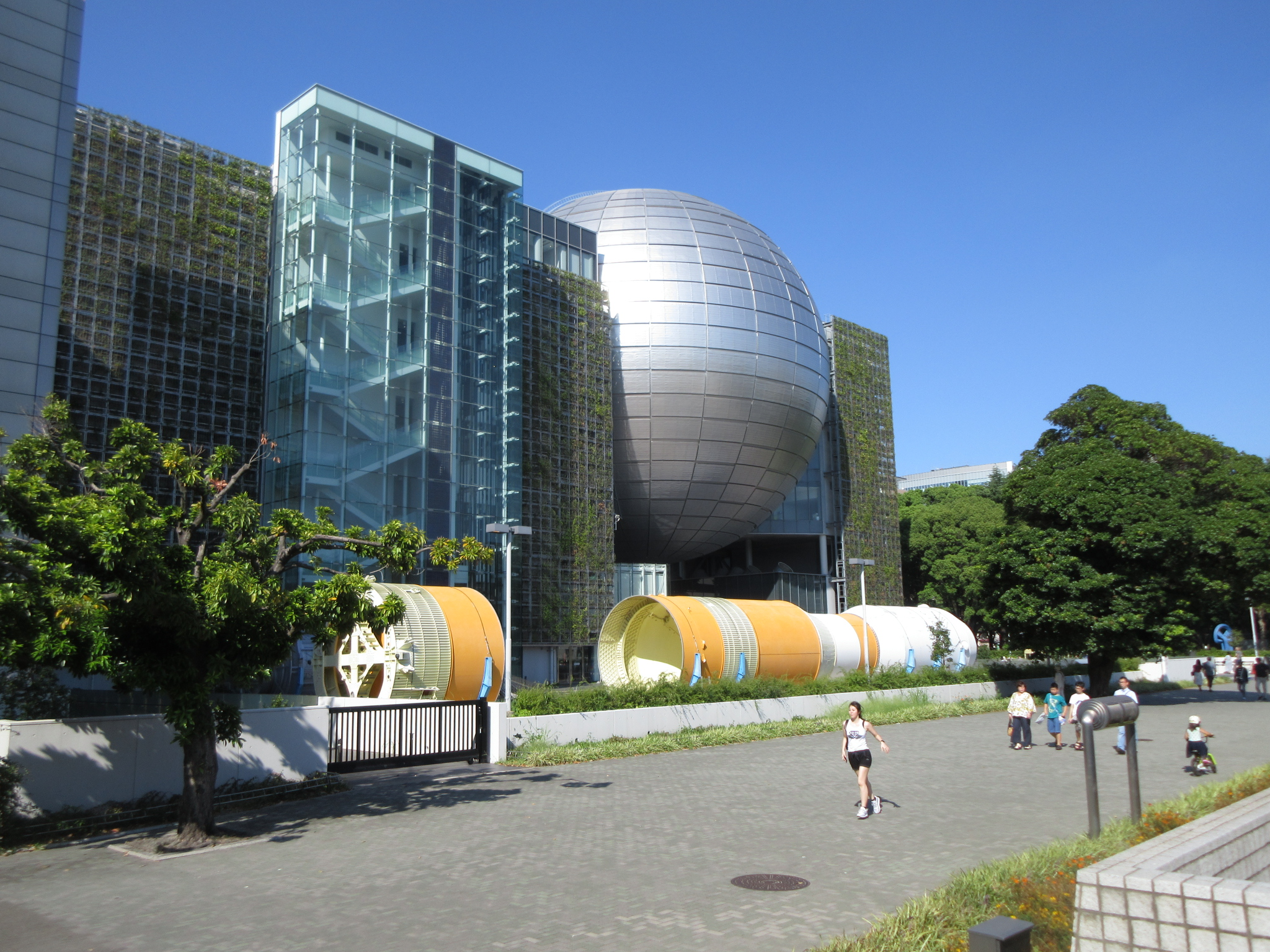 名古屋市科学館（名古屋市中区栄）